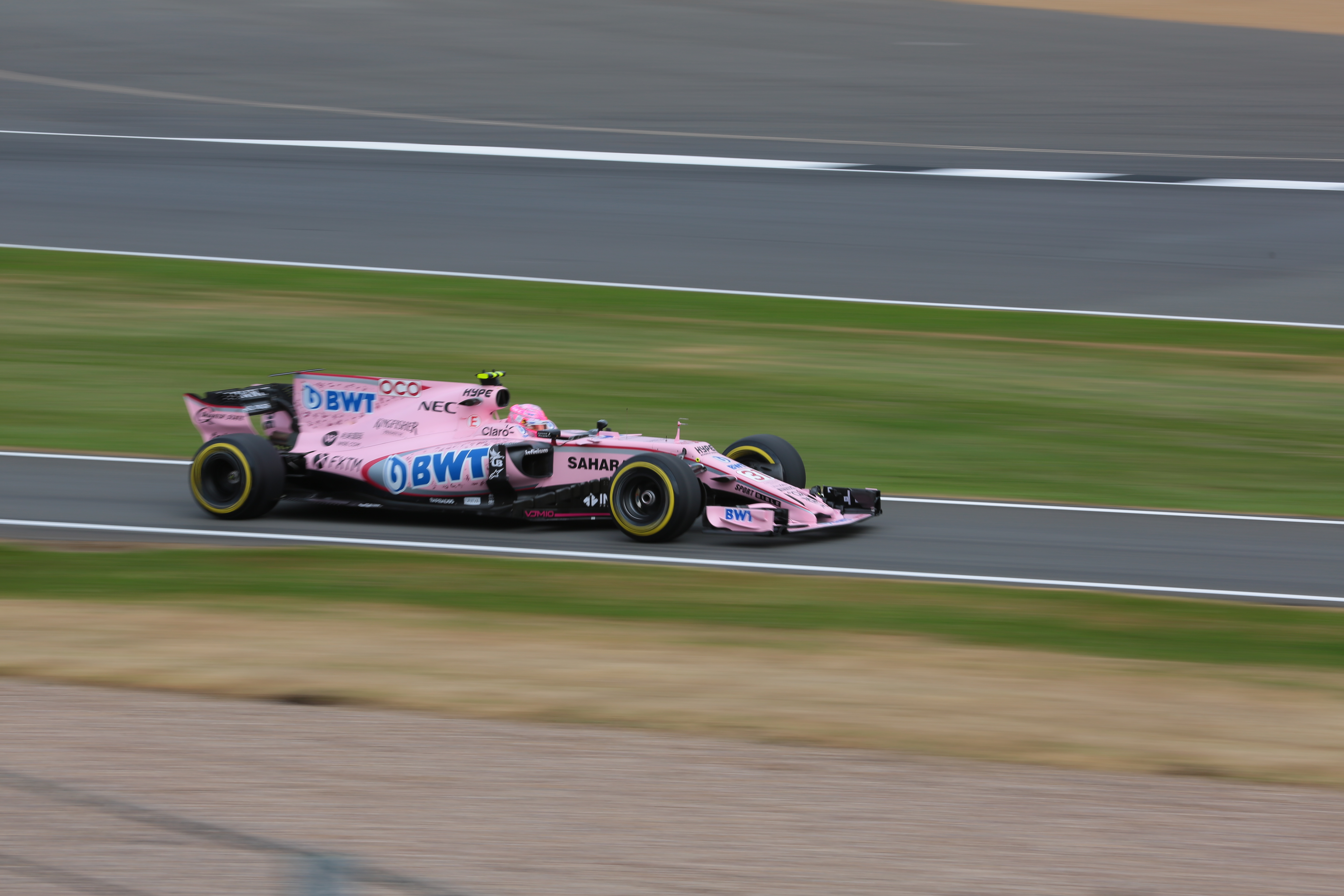 f1